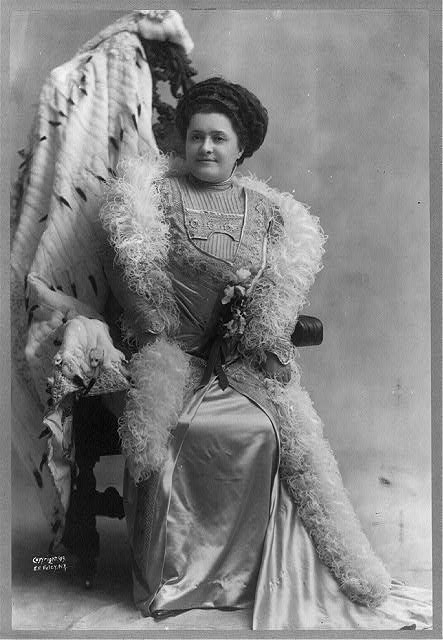 Luisa Tetrazzini (1871 - 1941), an Italian coloratura soprano